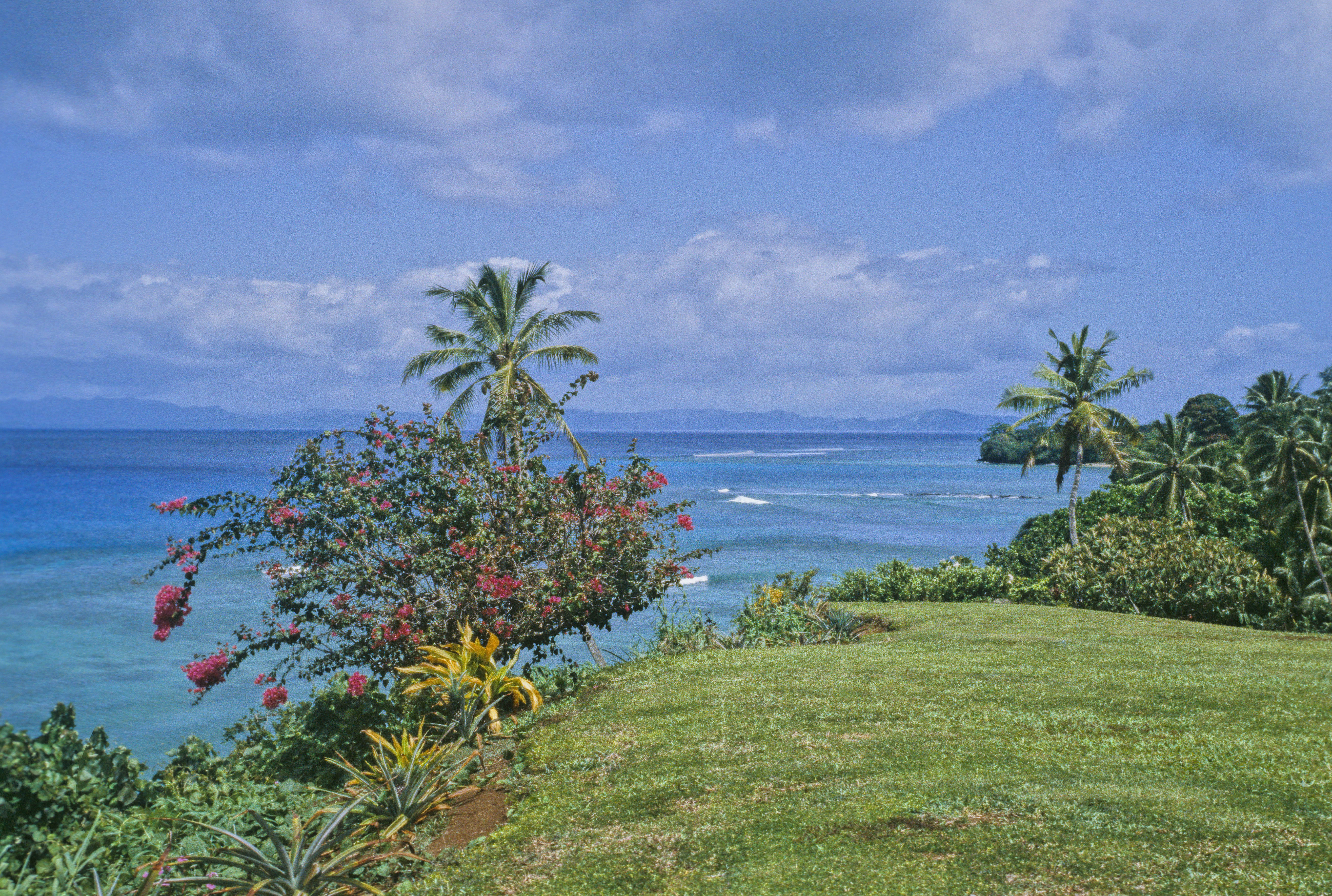 Taveuni, Fiji looking toward Matagi.